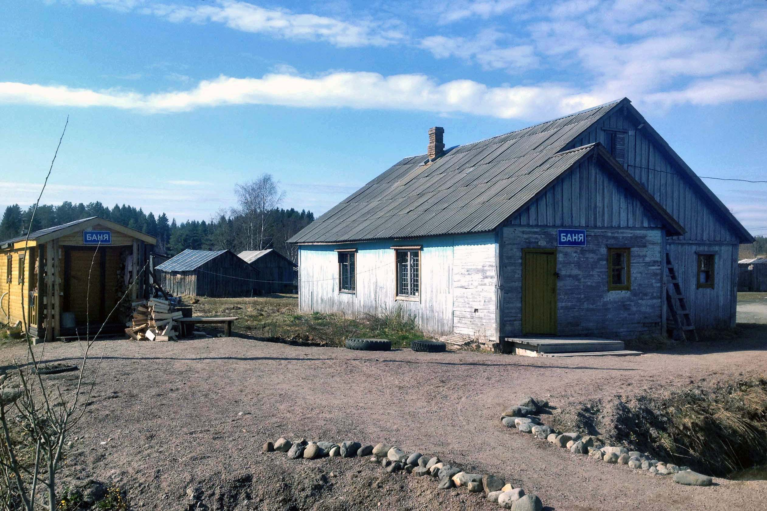 Общественная баня Харлу, улица Главное шоссе, дом 40. 29 апреля 2019 в 15:35:43.